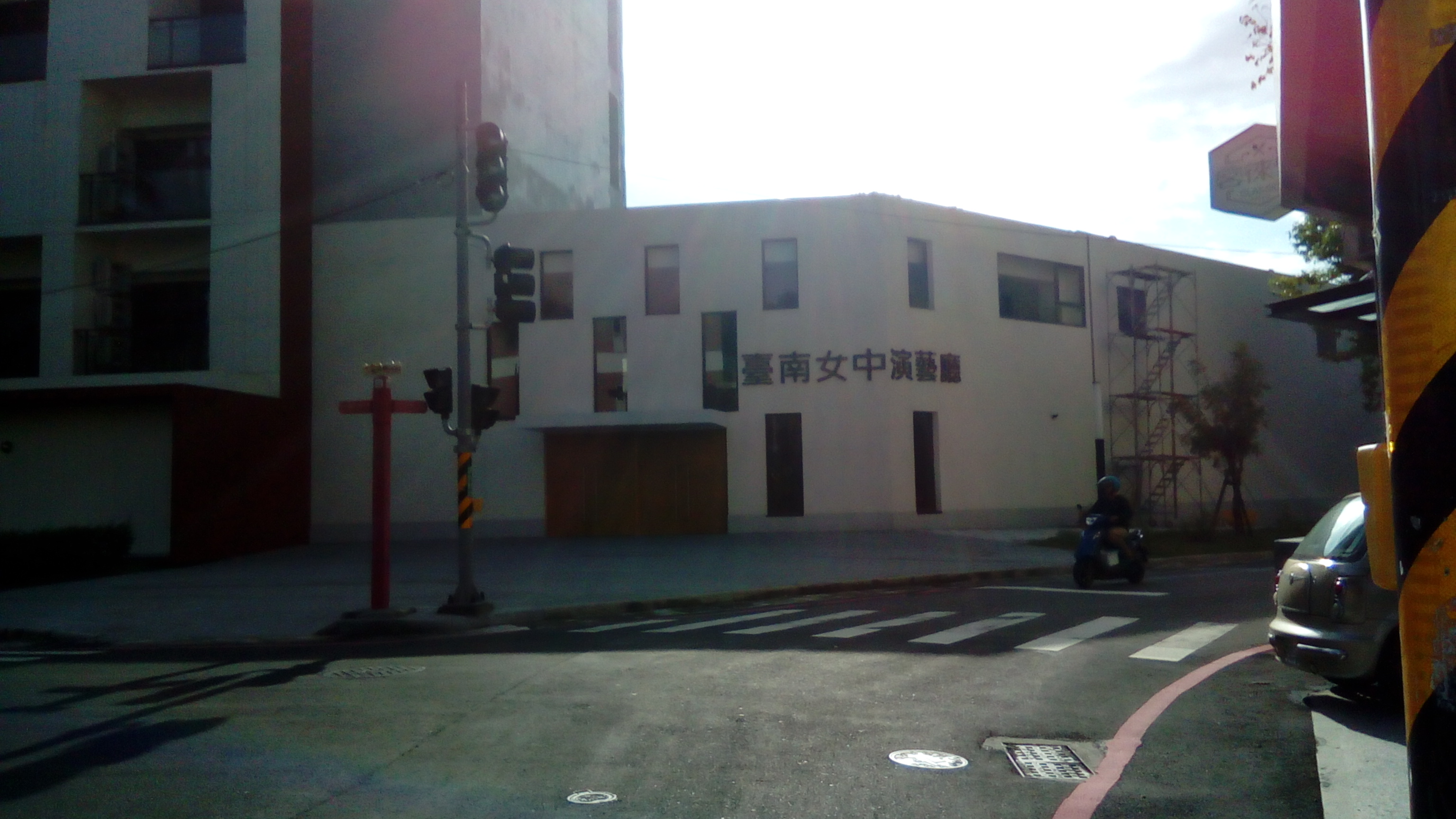 位於台南市中西區樹林街二段 南女校園內新落成不久的演藝廳